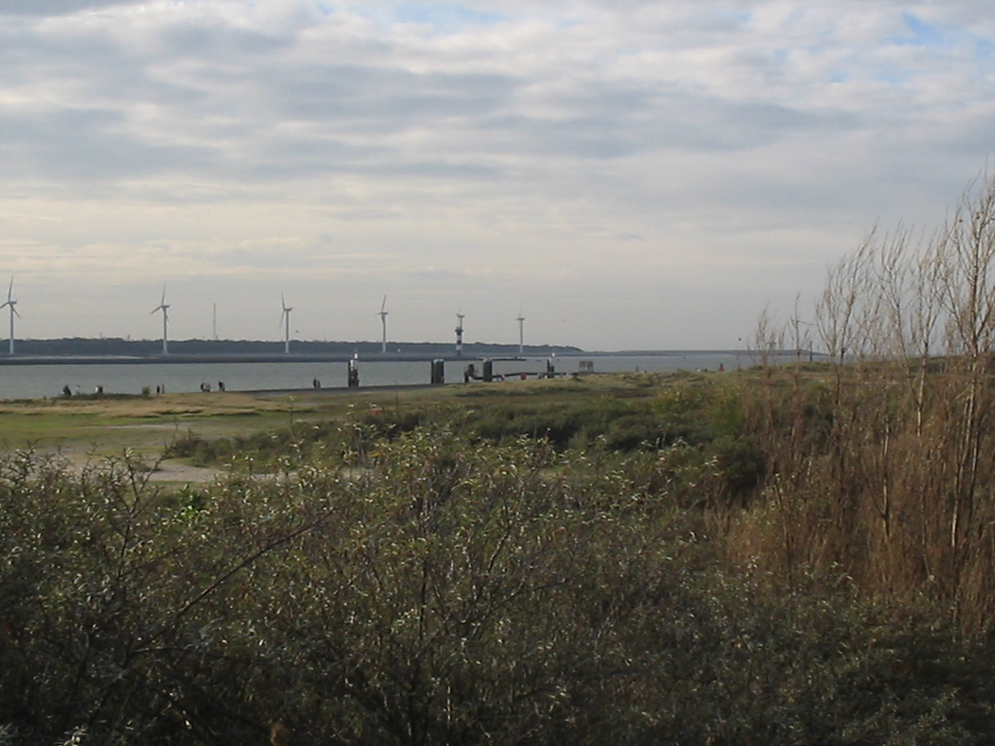 Duinen bij Hoek van Holland, 6 november 2005